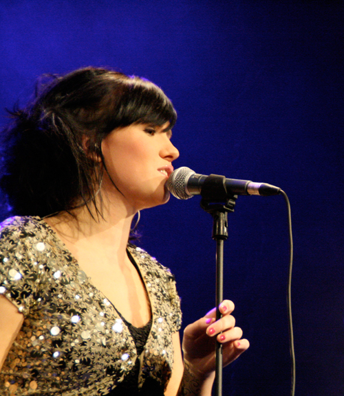 Anna Hertzman under en spelning på Ystad Teater 2009.